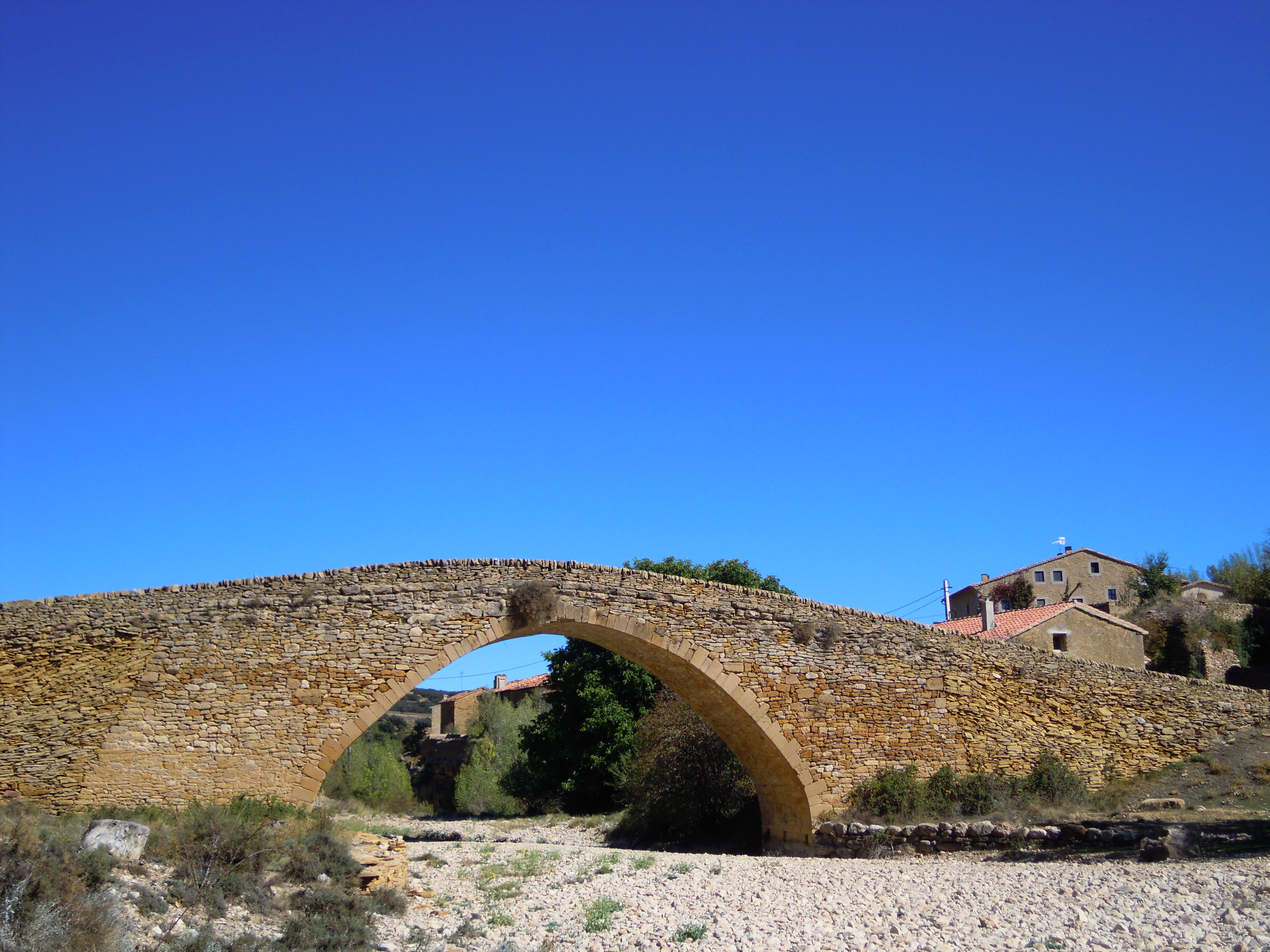 Pont Pobla del Bellestar